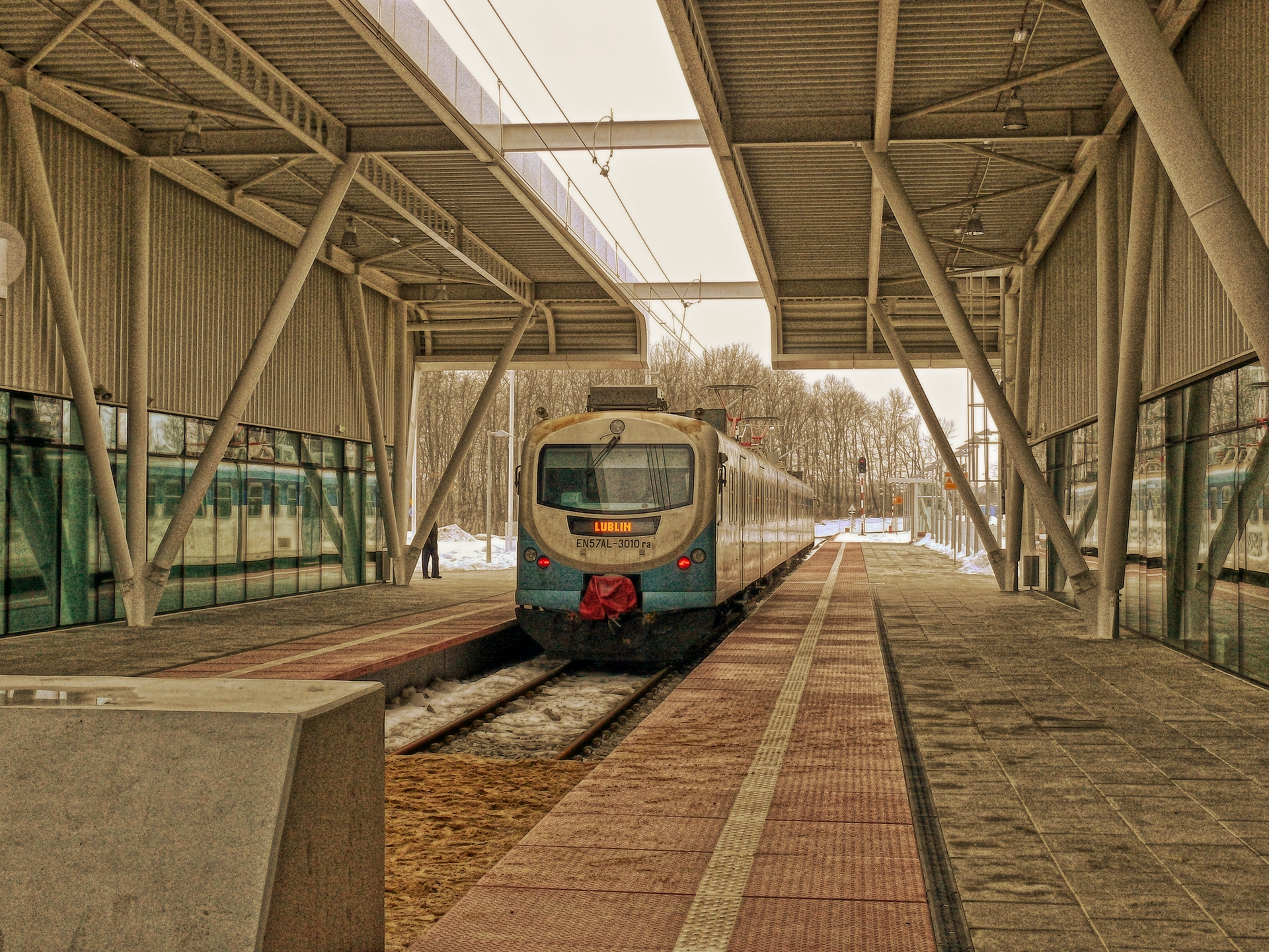 EN57AL na stacji Świdnik Port Lotniczy